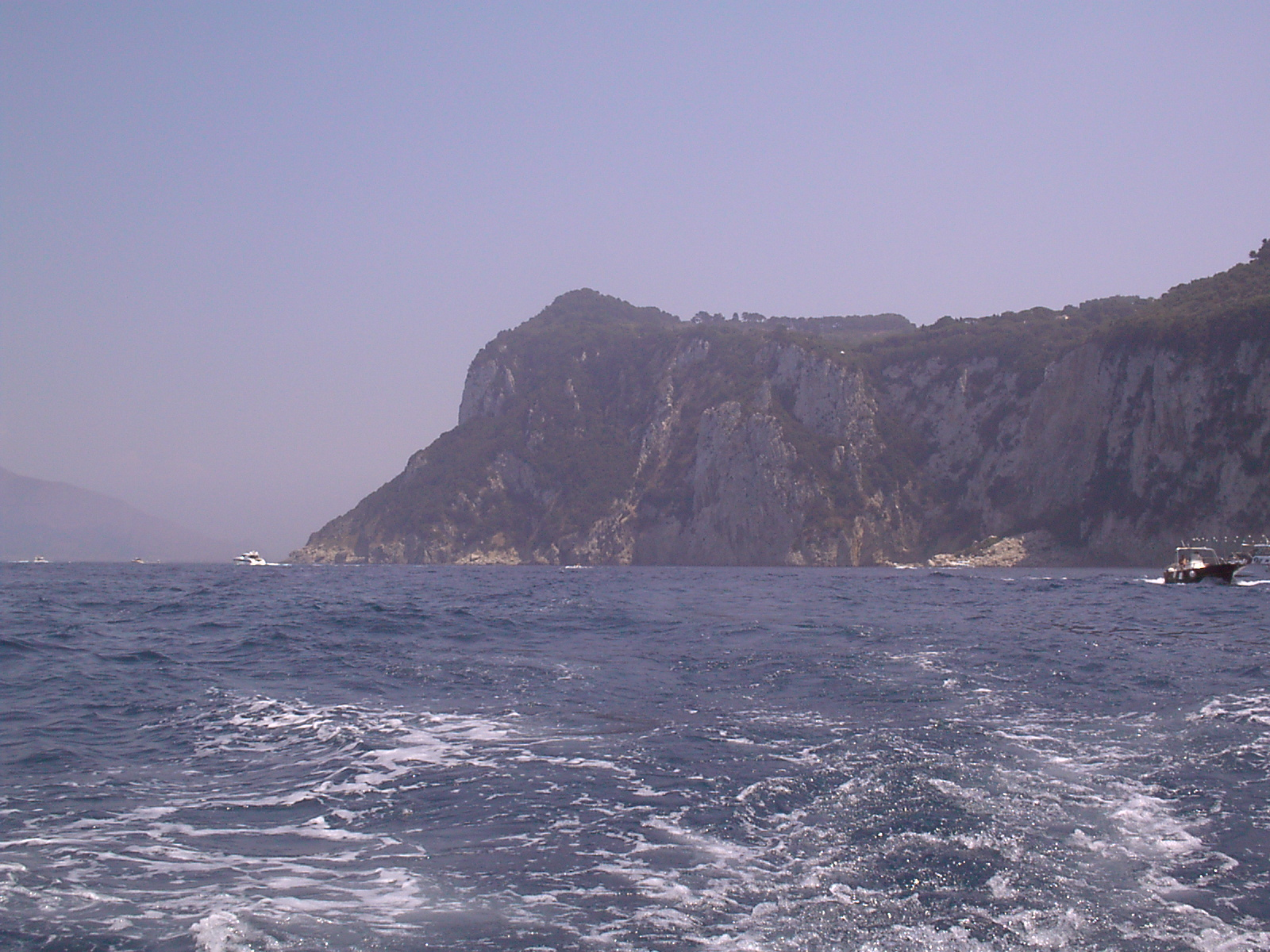 2001年7月28日 本人撮影 カプリ島